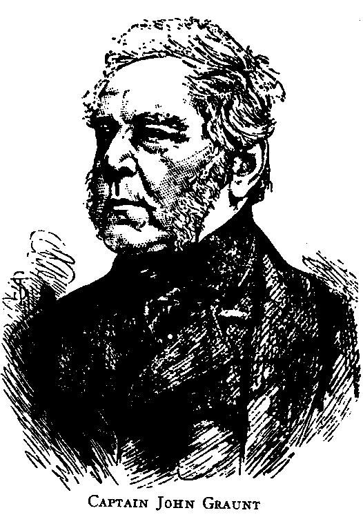 John Graunt